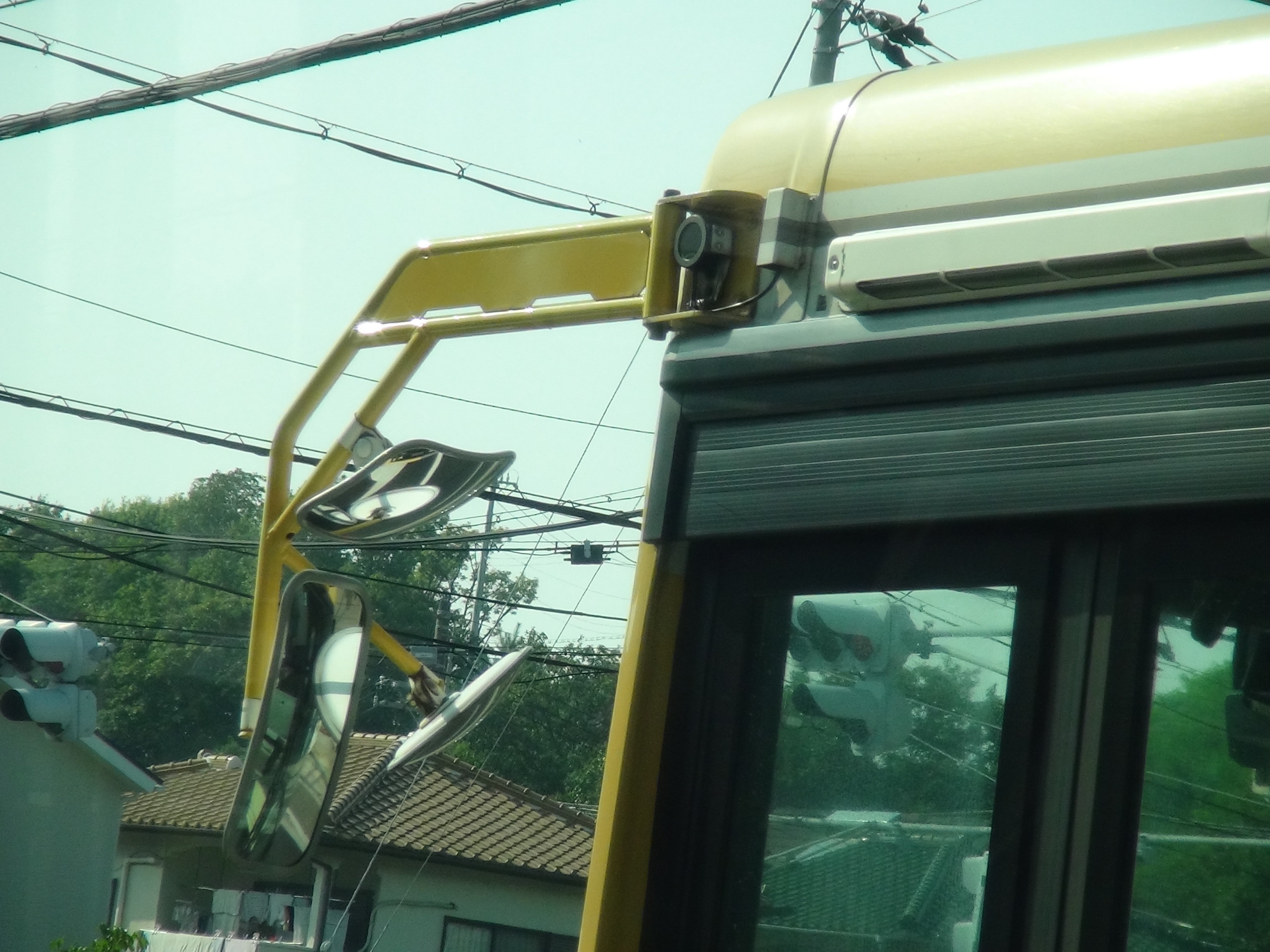 山陽バスの一部車両に取り付けられているライタグ